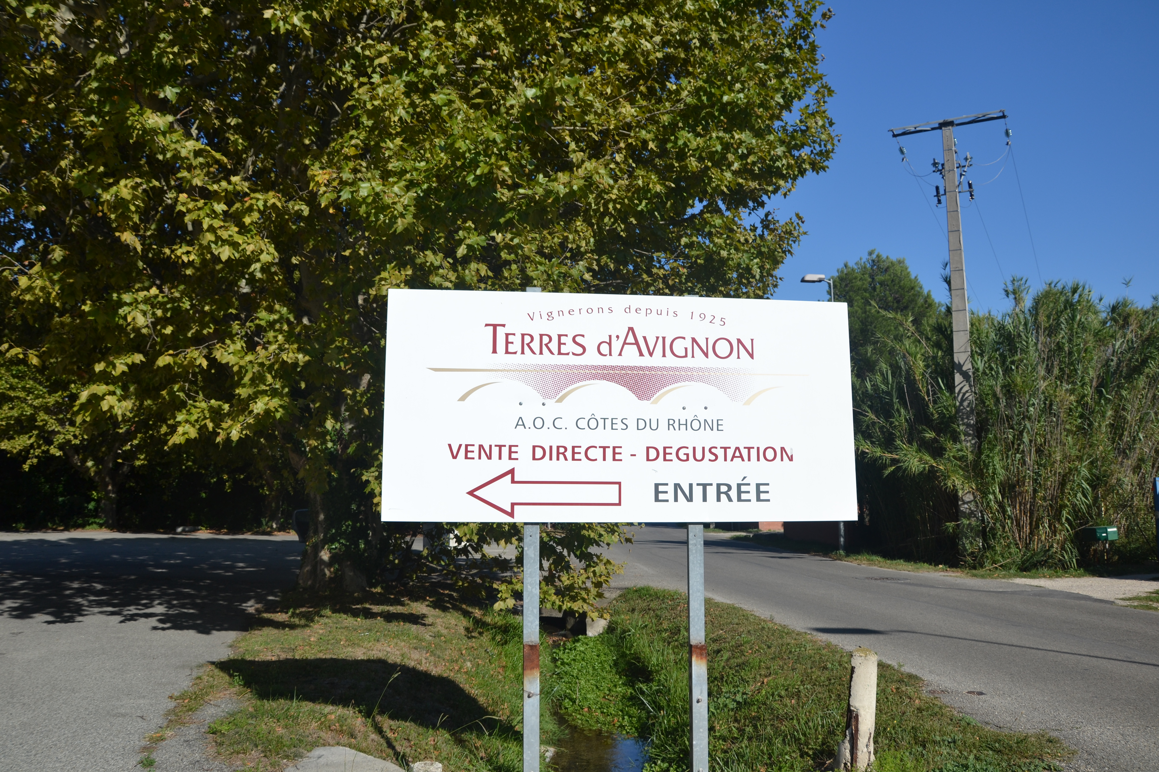 panneau d'entrée de la cave coopérative viticole de Châteauneuf de Gadagne